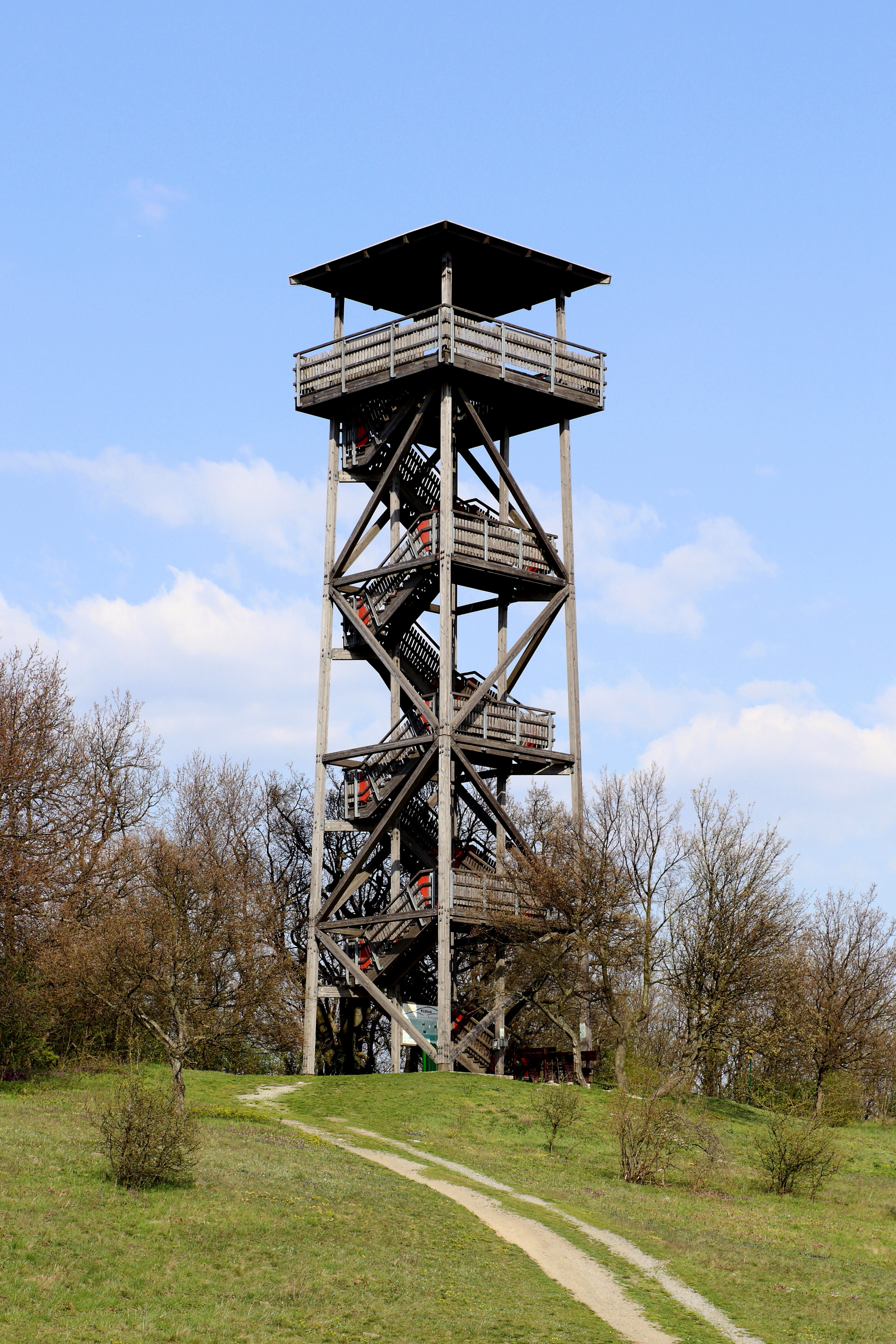 Aussichtsturm auf der 344 Meter hohen Königswarte, österreichs östlichster Berg. Der Aussichtsturm befindet sich genau auf der Gemeindegrenze von den niederösterreichischen Gemeinden Wolfsthal und Berg; hat eine Höhe von 22,7 Meter und wurde im Jahr 2001 errichtet.